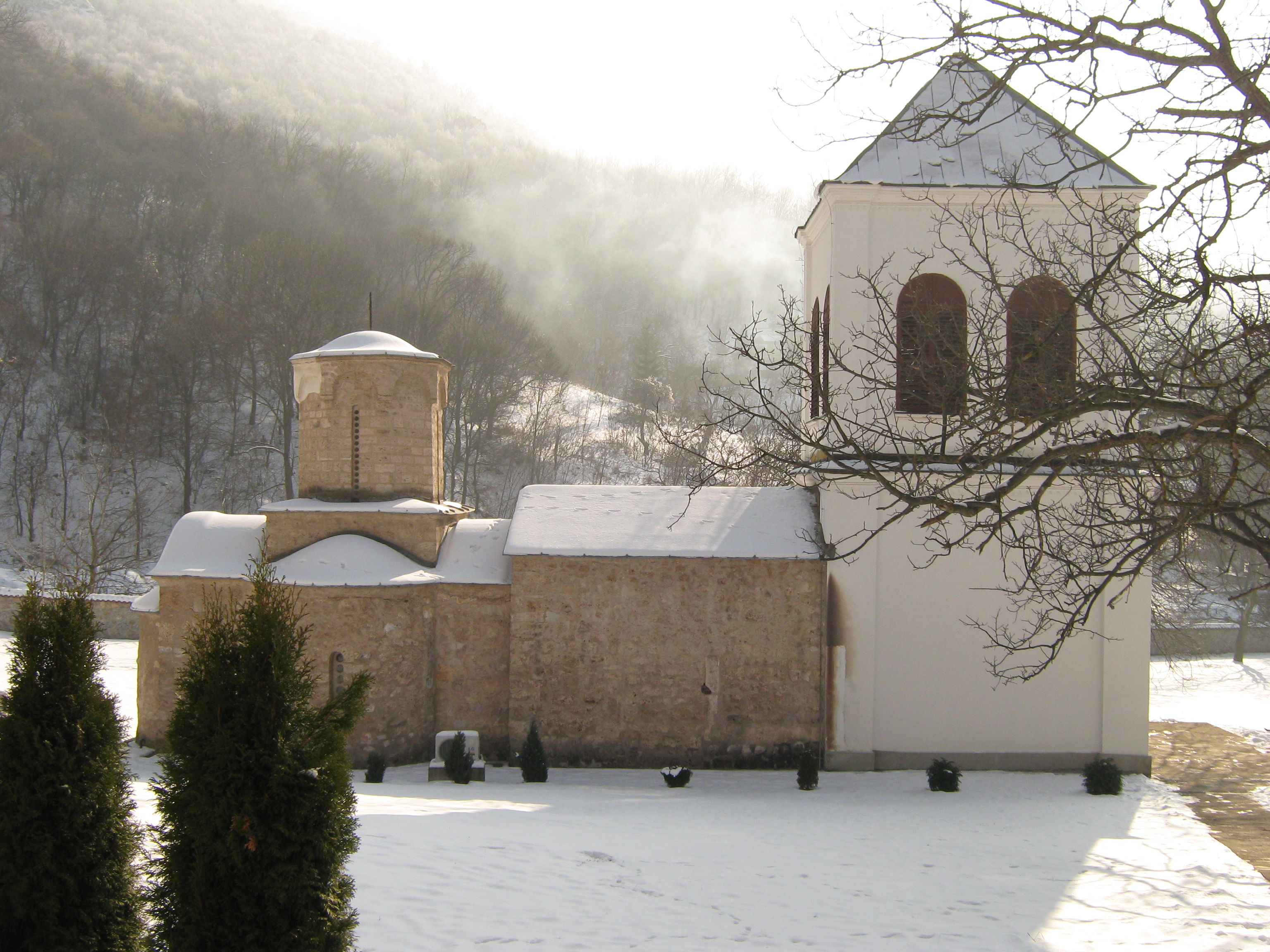 Manastir Sv. Stevan poznat u narodu kao manastir Lipovac po istoimenom selu u kome se nalazi.